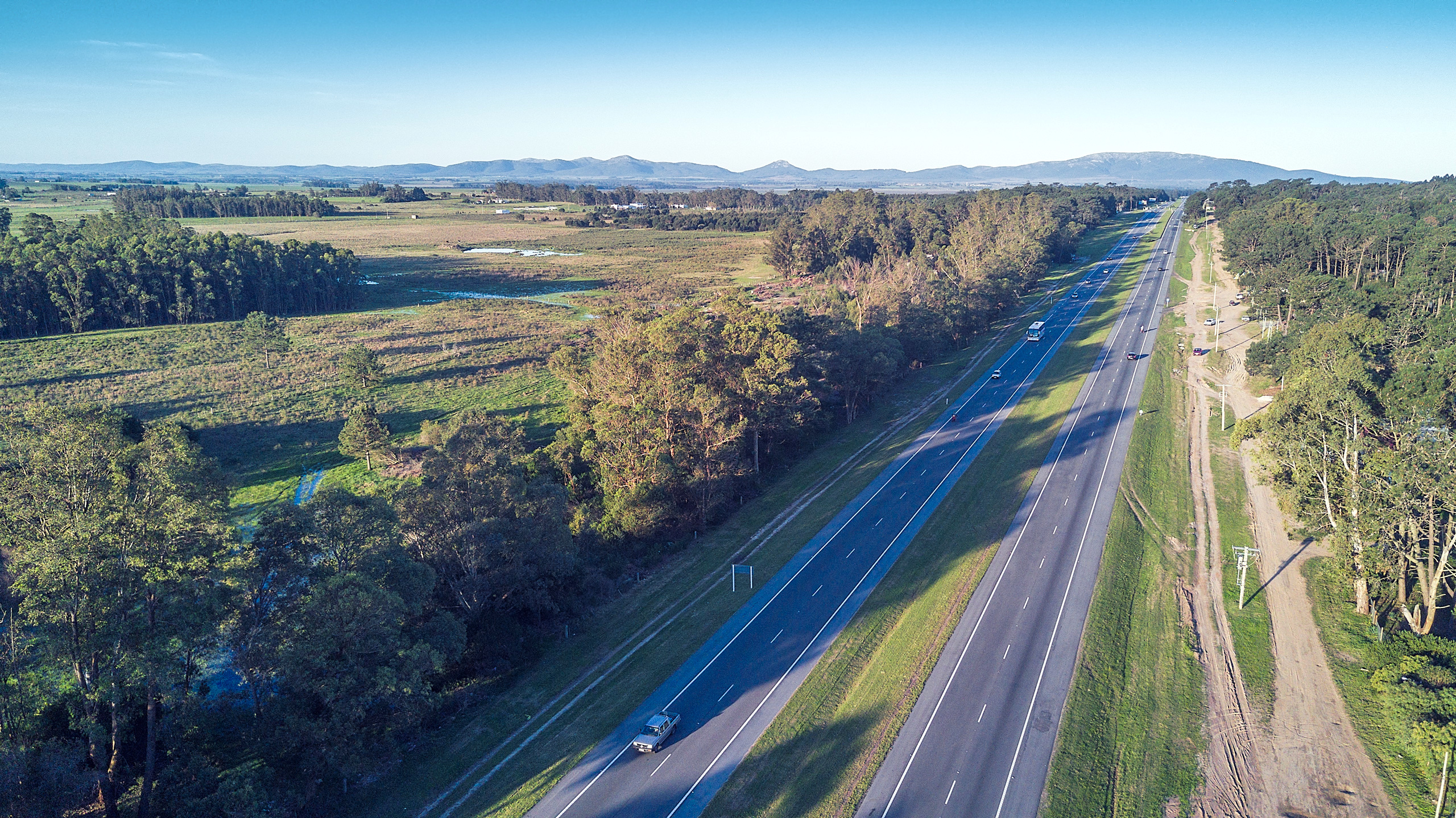 Ruta IB